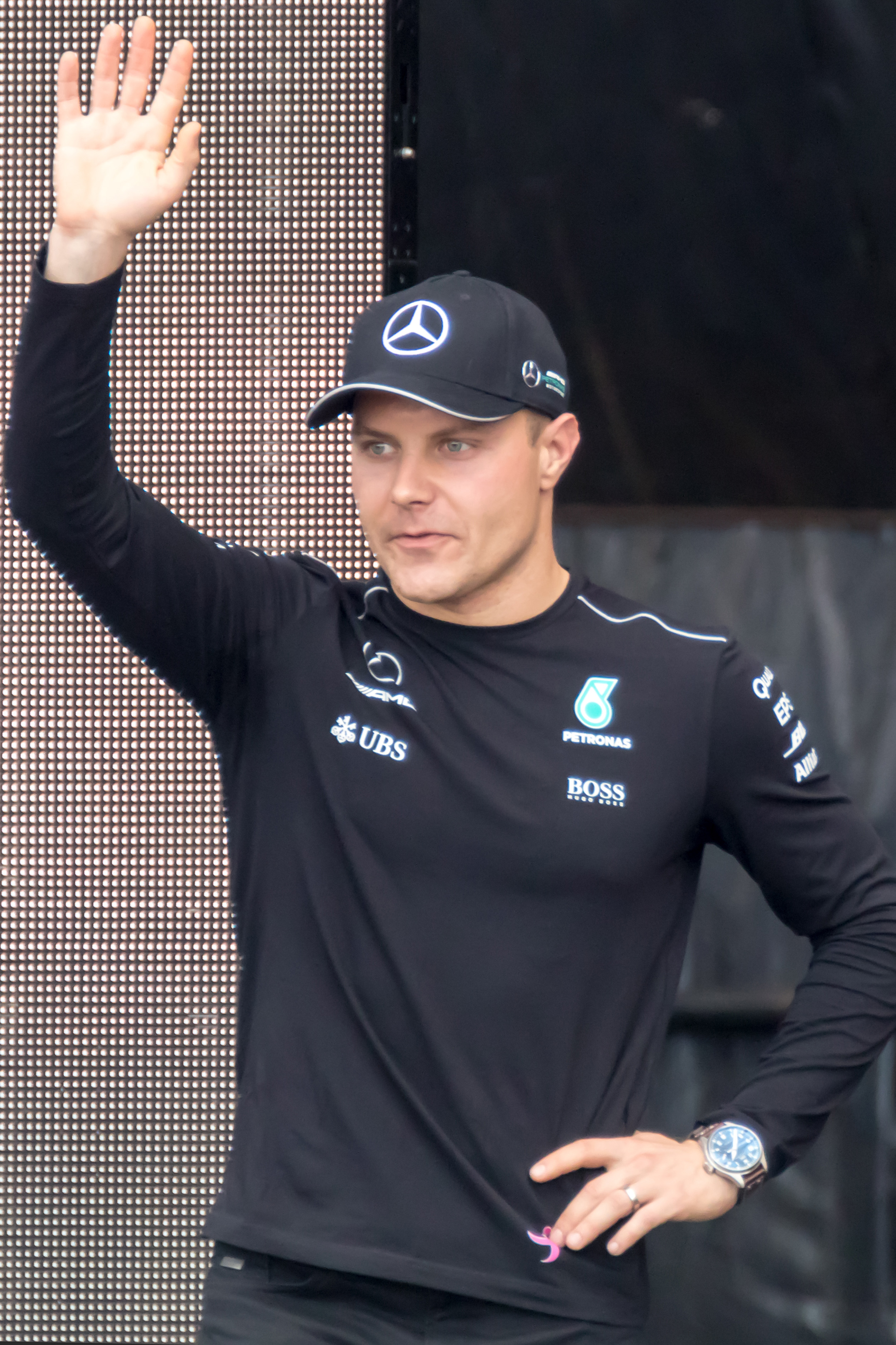 Valtteri Bottas interview